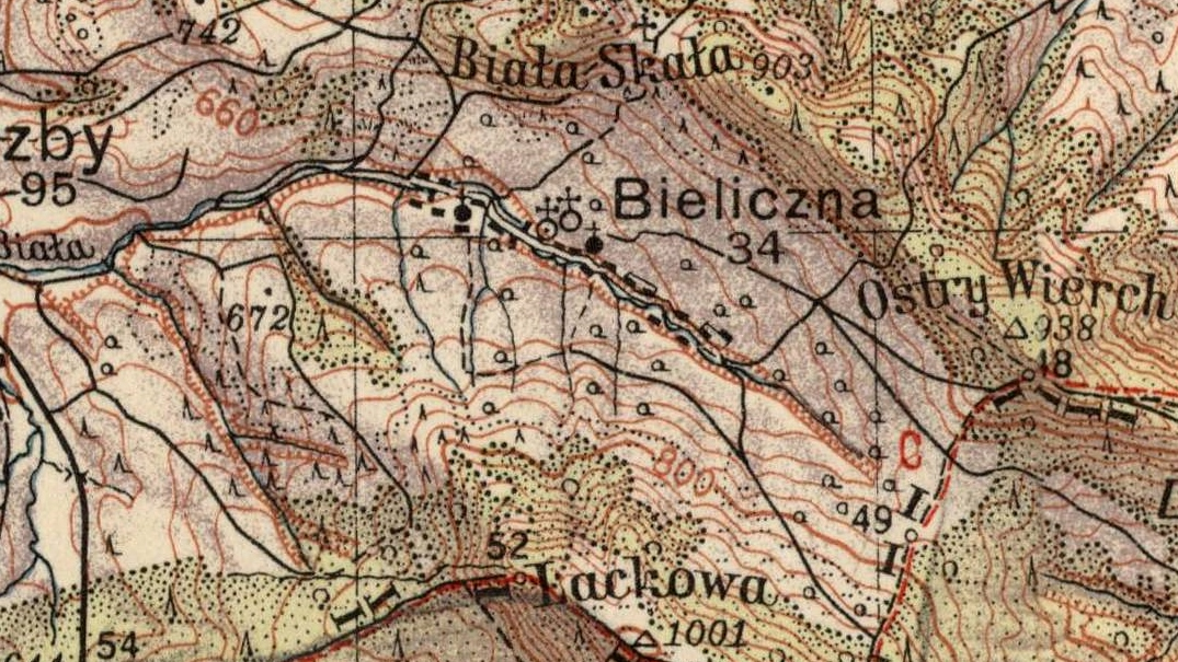 fragment mapy "Krynica" wydanej przez Wojskowy Instytut Geograficzny w 1936 roku w skali 1:100 000